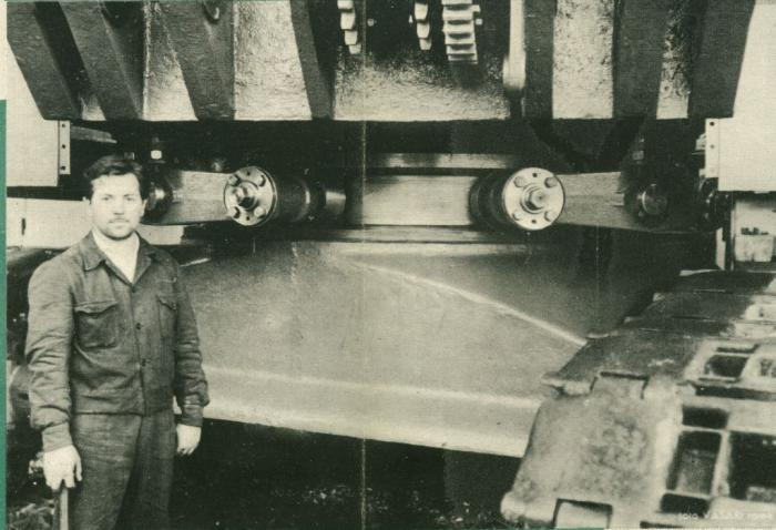 Un operaio della Fiorentini davanti al FB200 per evidenziarne la grandezza.